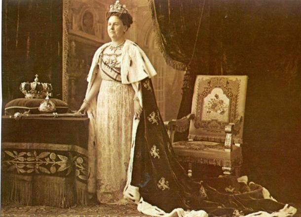 Guillermina fue la última monarca en portar el manto original como vemos en la foto.